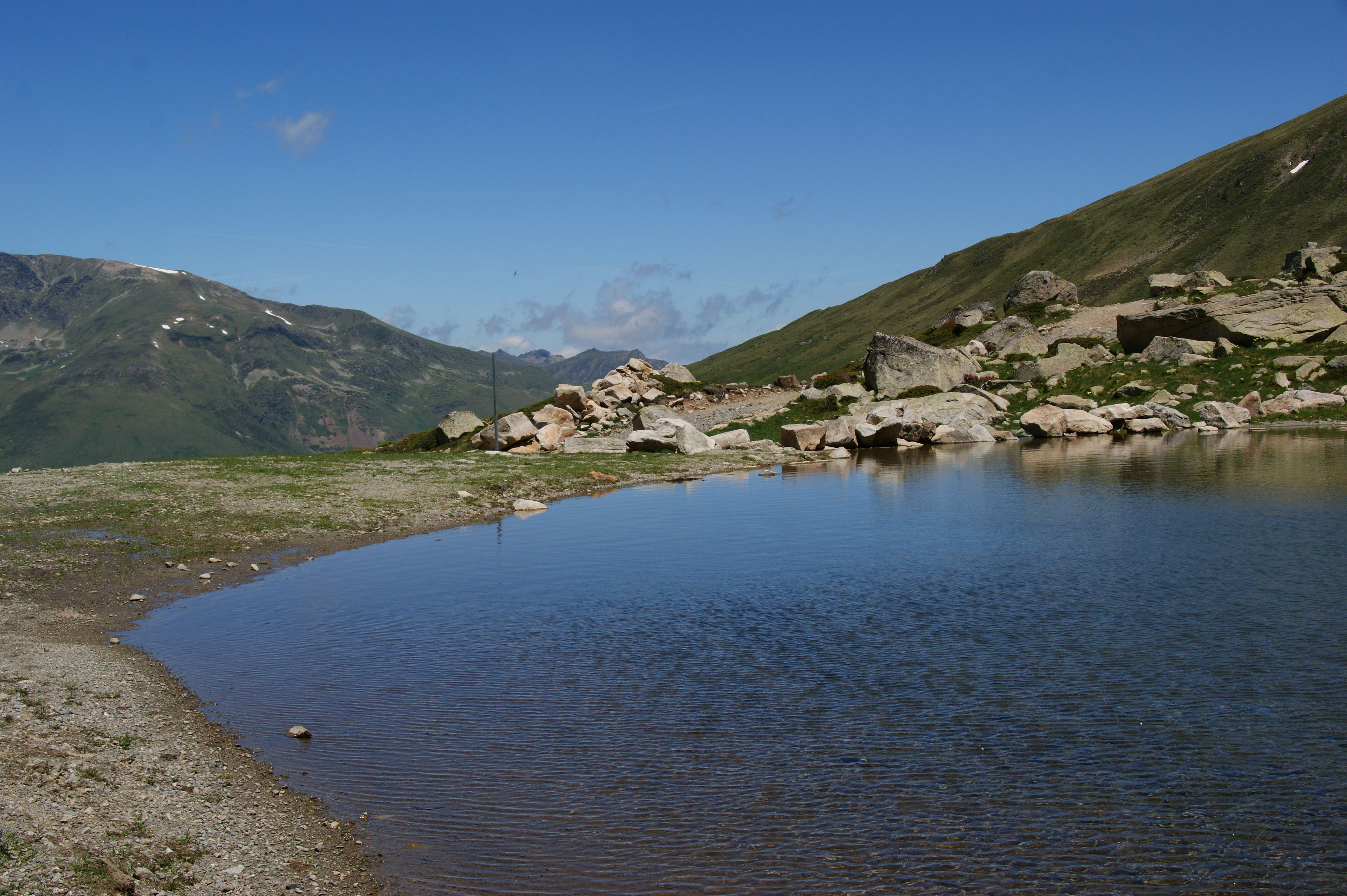 Estany de les Abelletes This is a a photo of a lake or pond in Andorra with id: IEA-BE-29